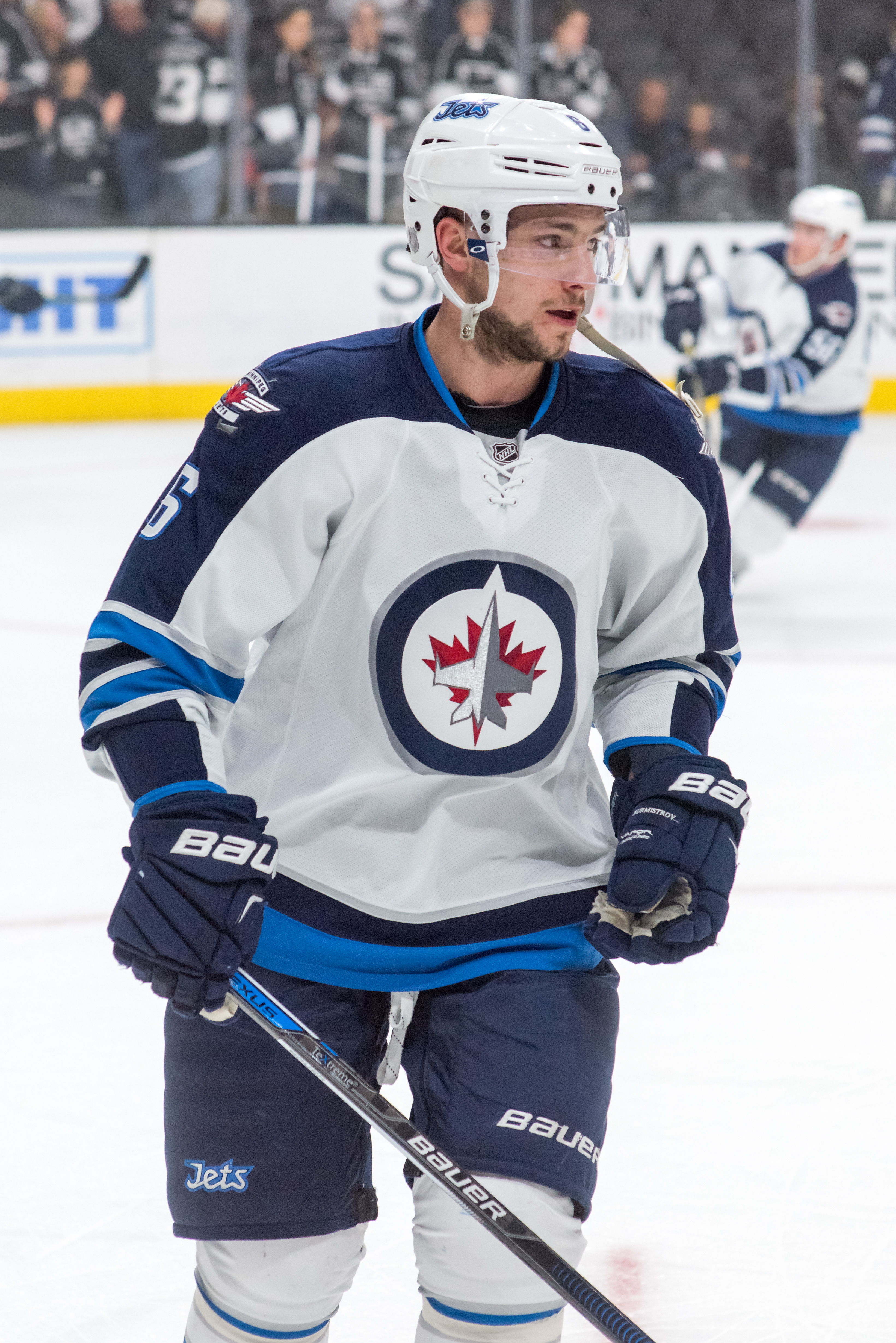 Alexander Burmistrov (Александр Бурмистров)